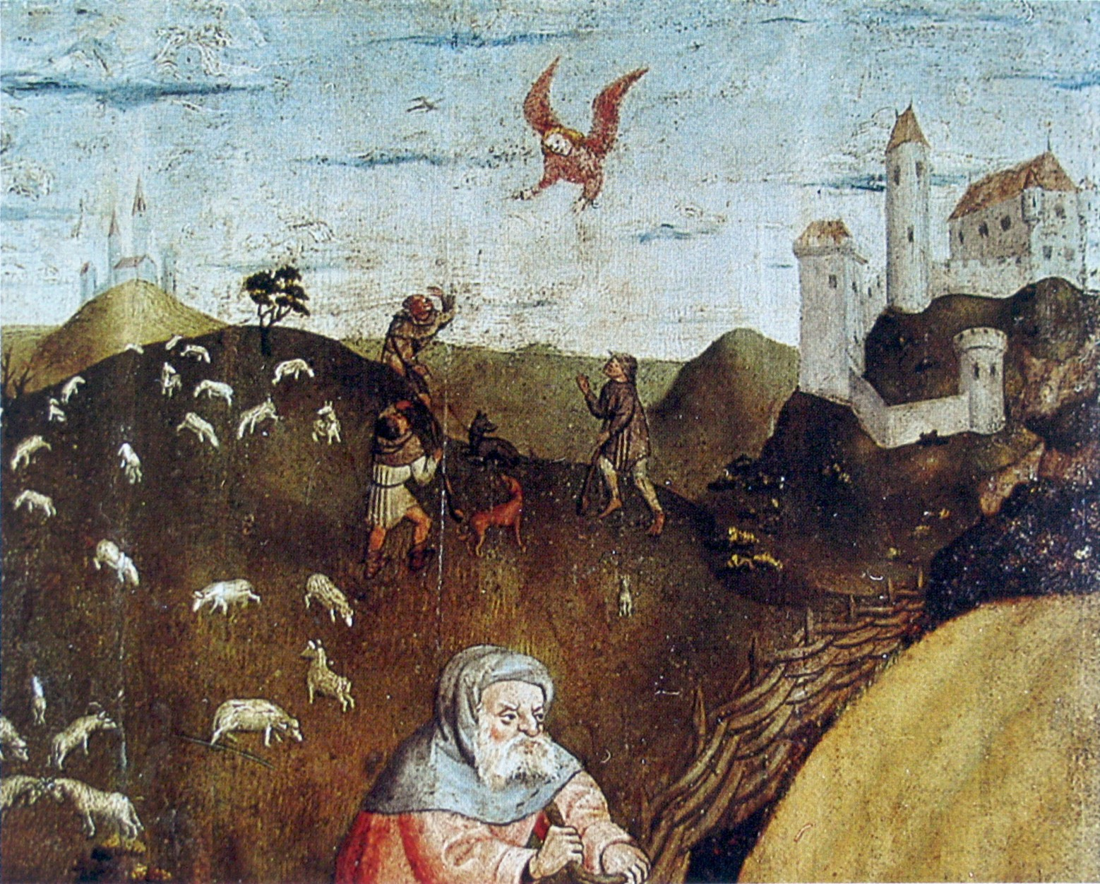 Ausschnitt aus dem Bild „Geburt Christi“ vom Meister der Pollinger Tafeln; im Bild links Burg Andechs in einer Idealdarstellung, rechts Hochschloss Pähl